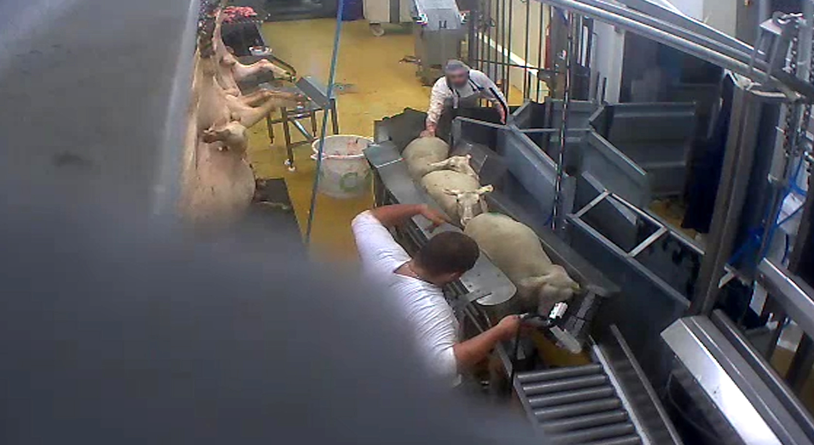 Employés d'un abattoir s'occupant de moutons